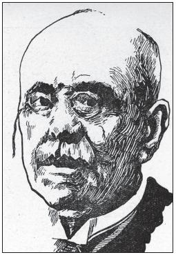 Антон Драндар.